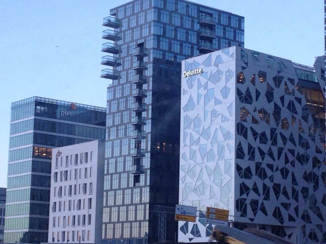 Deloittehuset på Sørenga i Oslo